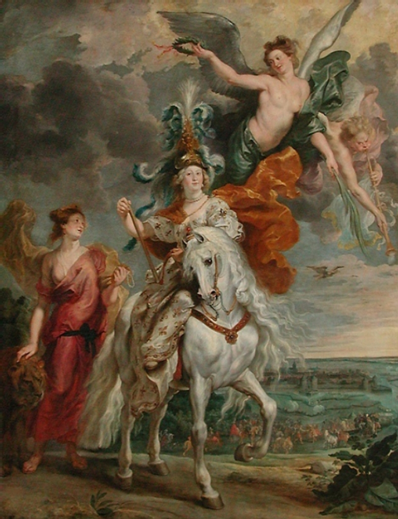 La conclusion de la paix à Angers (10 août 1620)